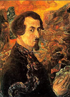 Автопортрет Василия Дмитриевич Милиоти